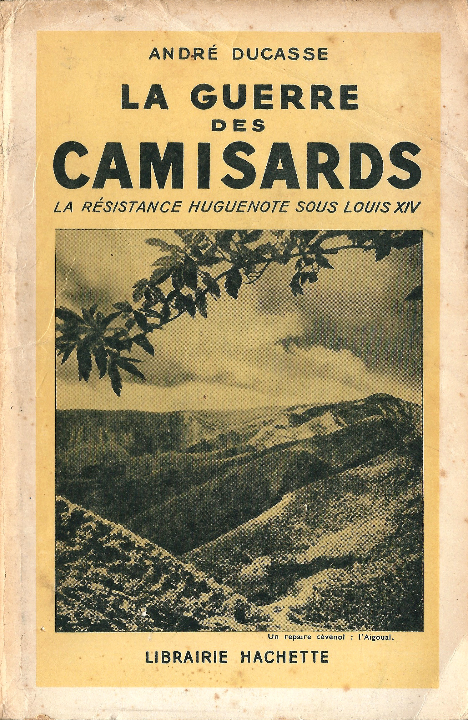 Couverture de l'ouvrage d'André Ducasse, La Guerre des Camisards, librairie Hachette, 1945-1946